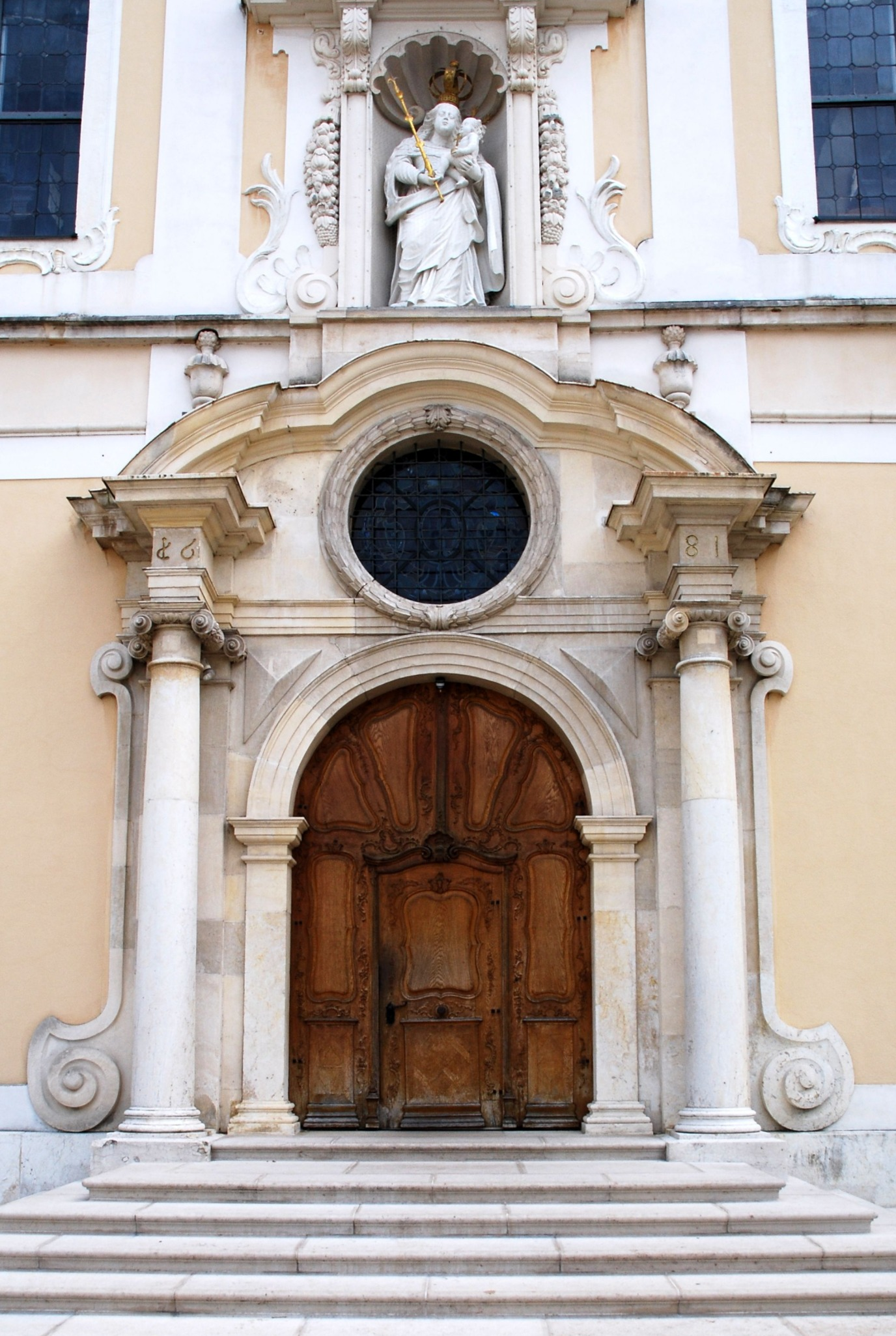 Portal des Arlesheimer Doms